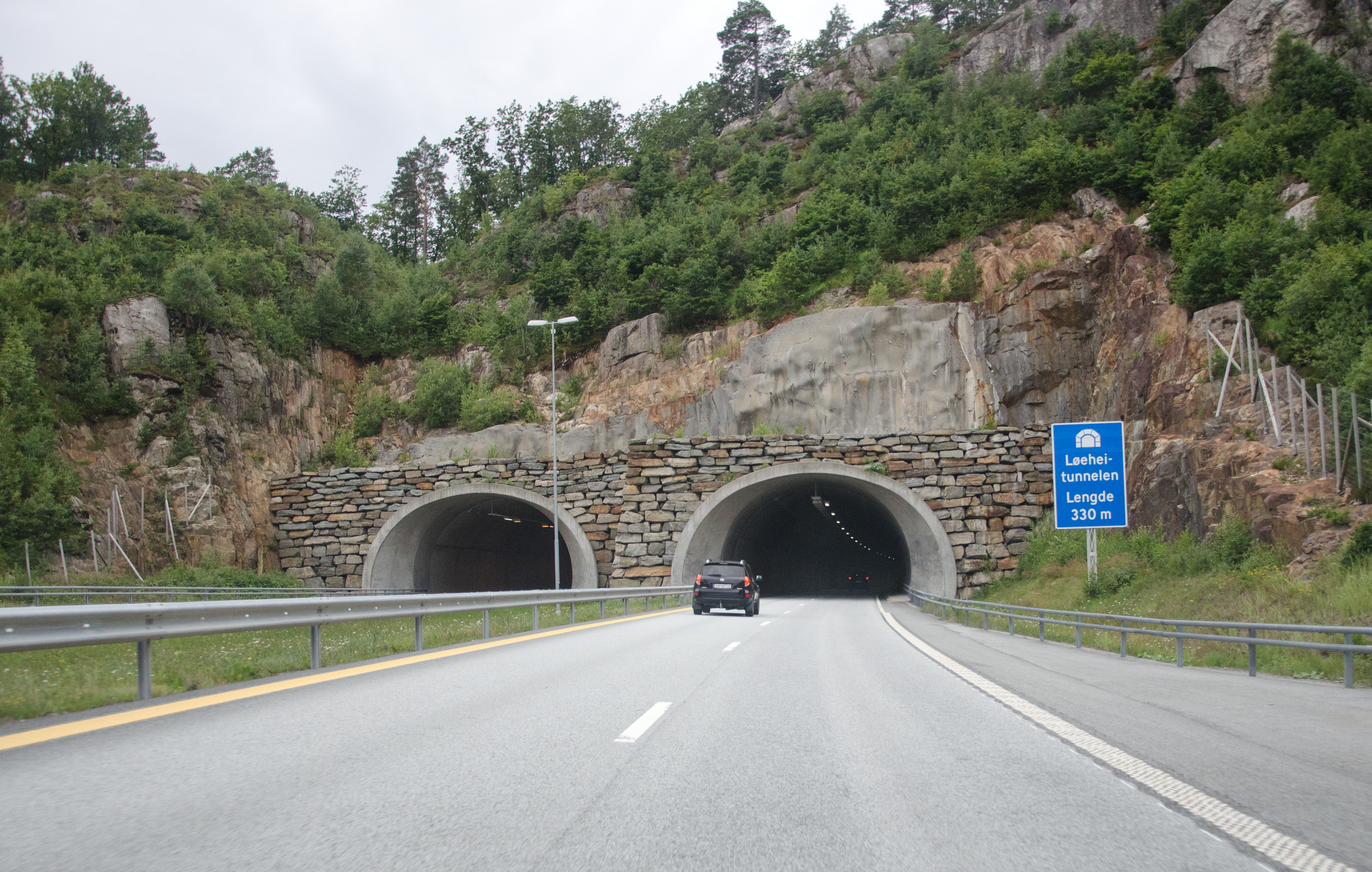 Løeheitunnelen på E18